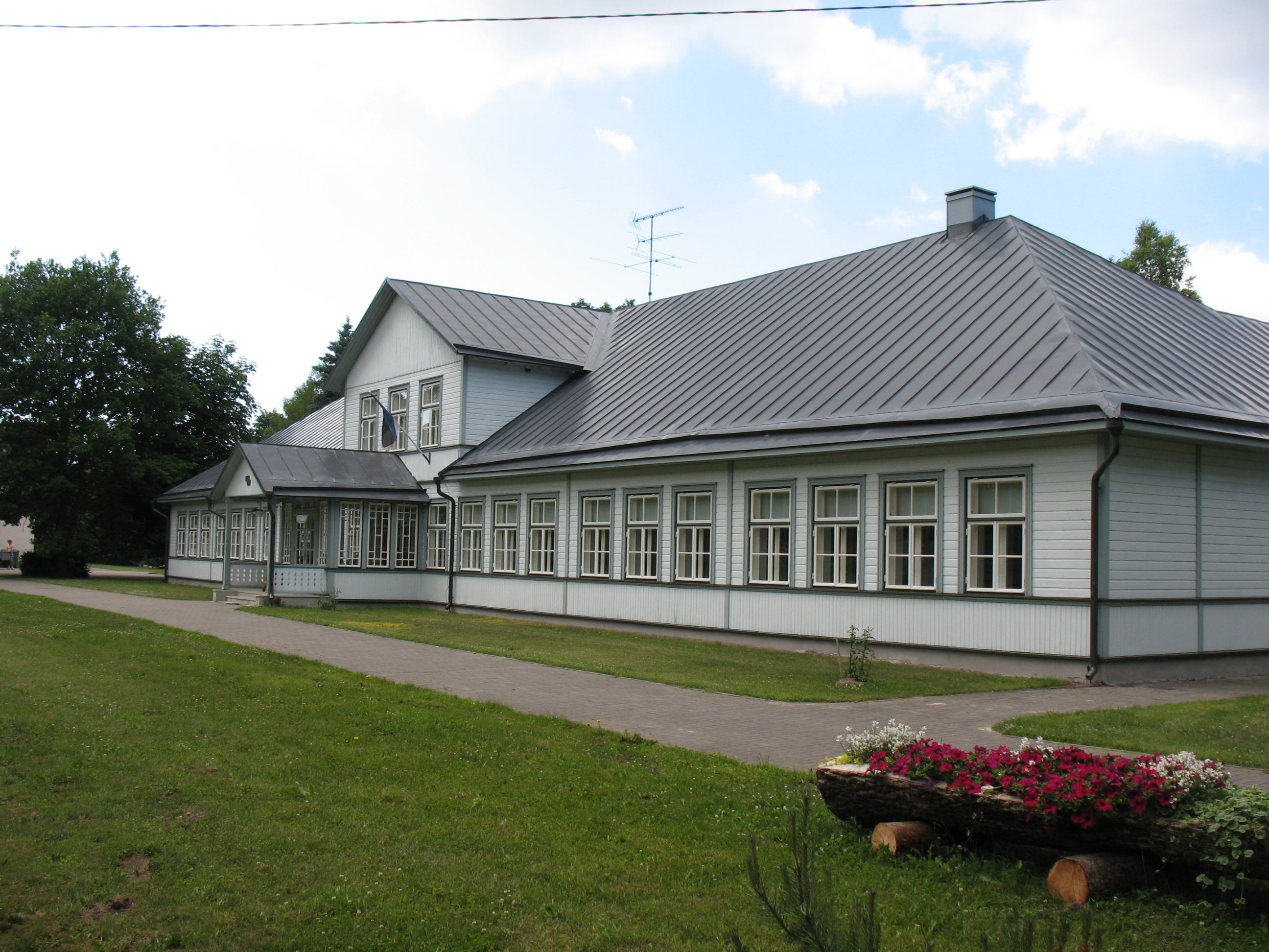 Läänemaa, Nõva vald